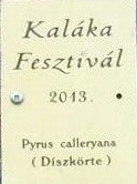 Kaláka Fesztivál-emléktábla, Érsekkert